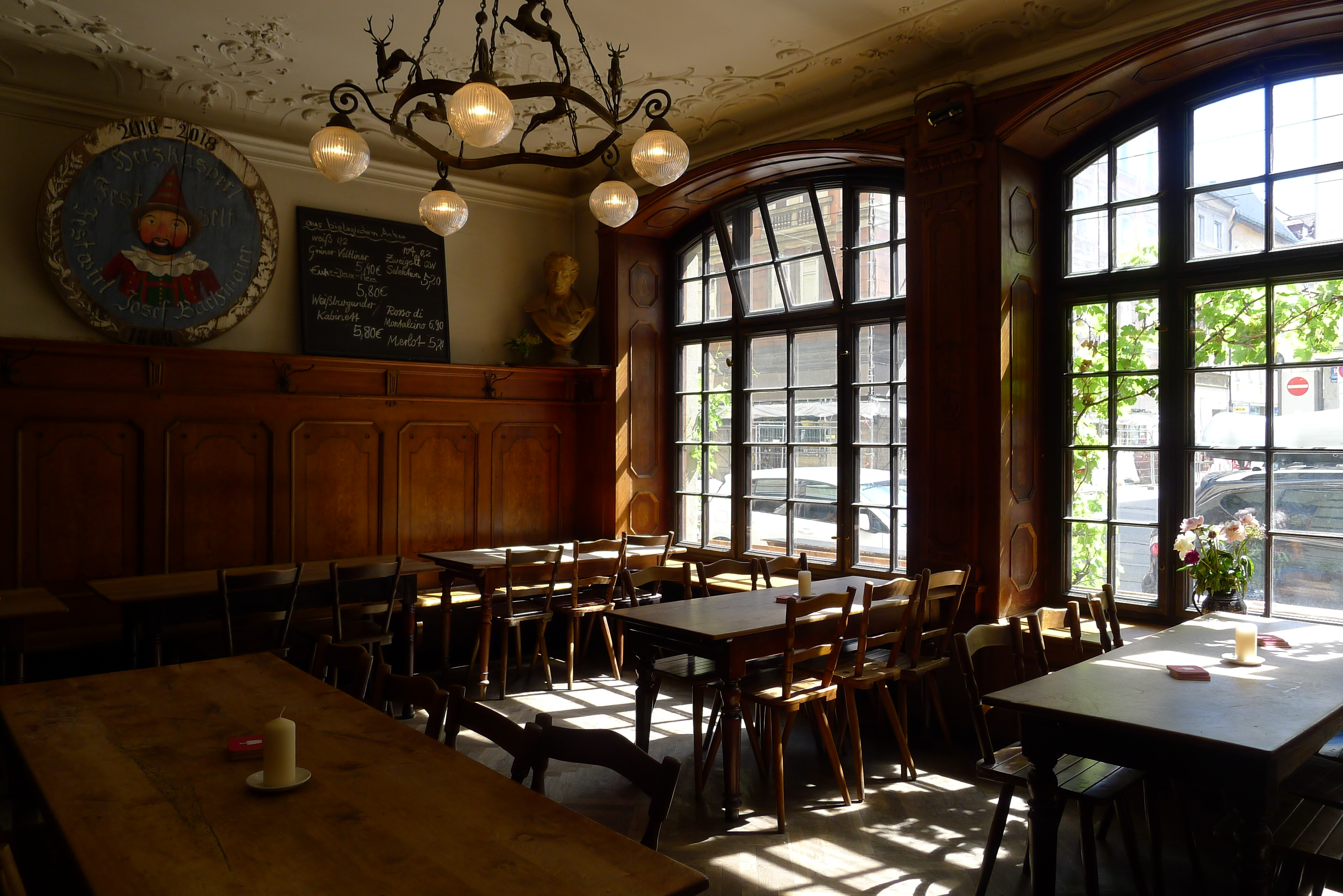 Das Fraunhofer in München - Innenraum der Gaststätte mit alter Möblierung